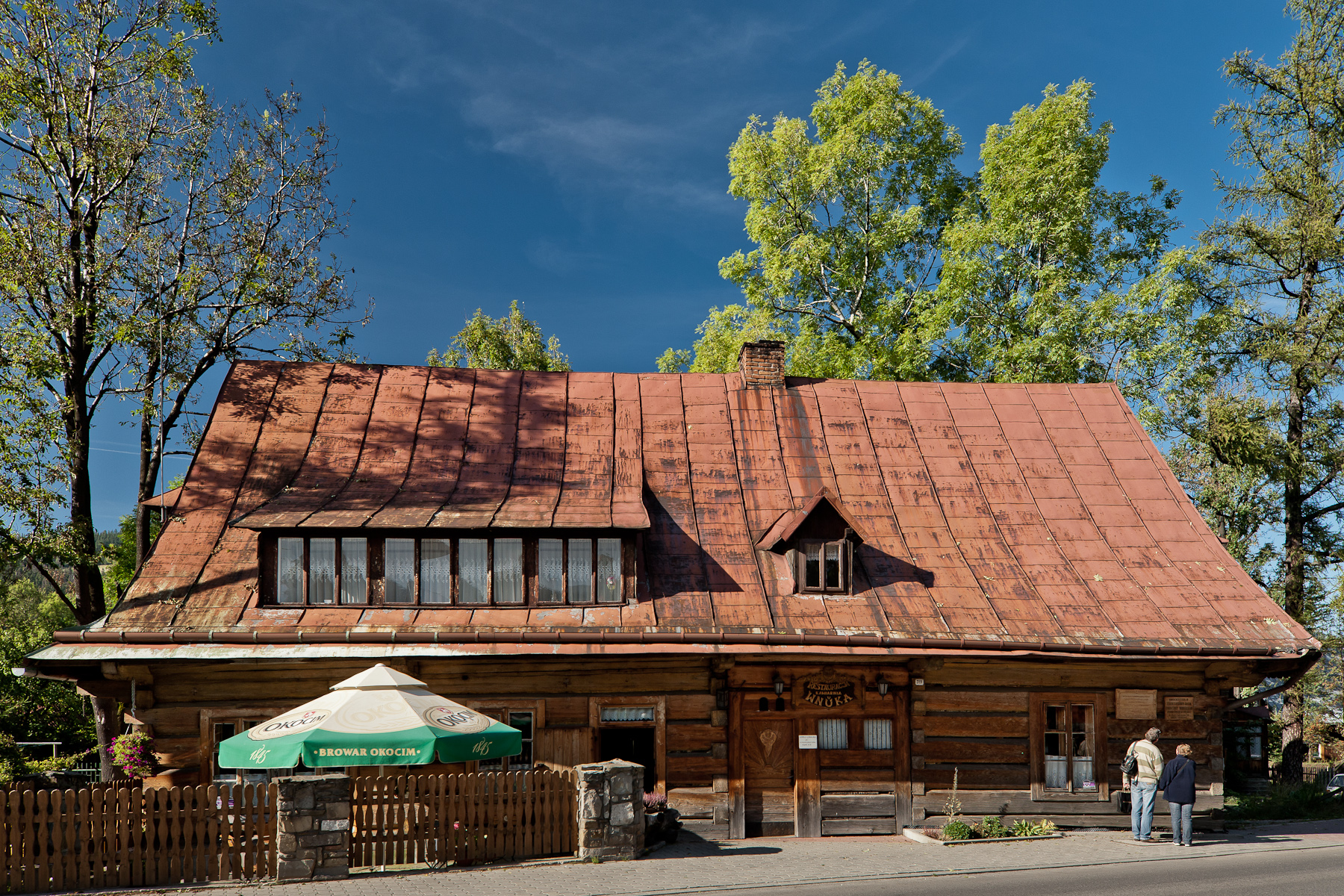 Karczma „U Wnuka”, Zakopane (zabytek nr rejestr. A-1136/M)